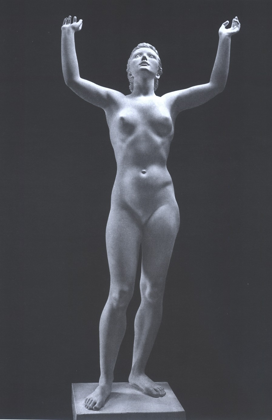 Copyright Museum Arno Breker/MARCO-VG, Bonn Op 13.02.07 schrift. toestemming aan Jos43 tot publicatie in Wikipedia.